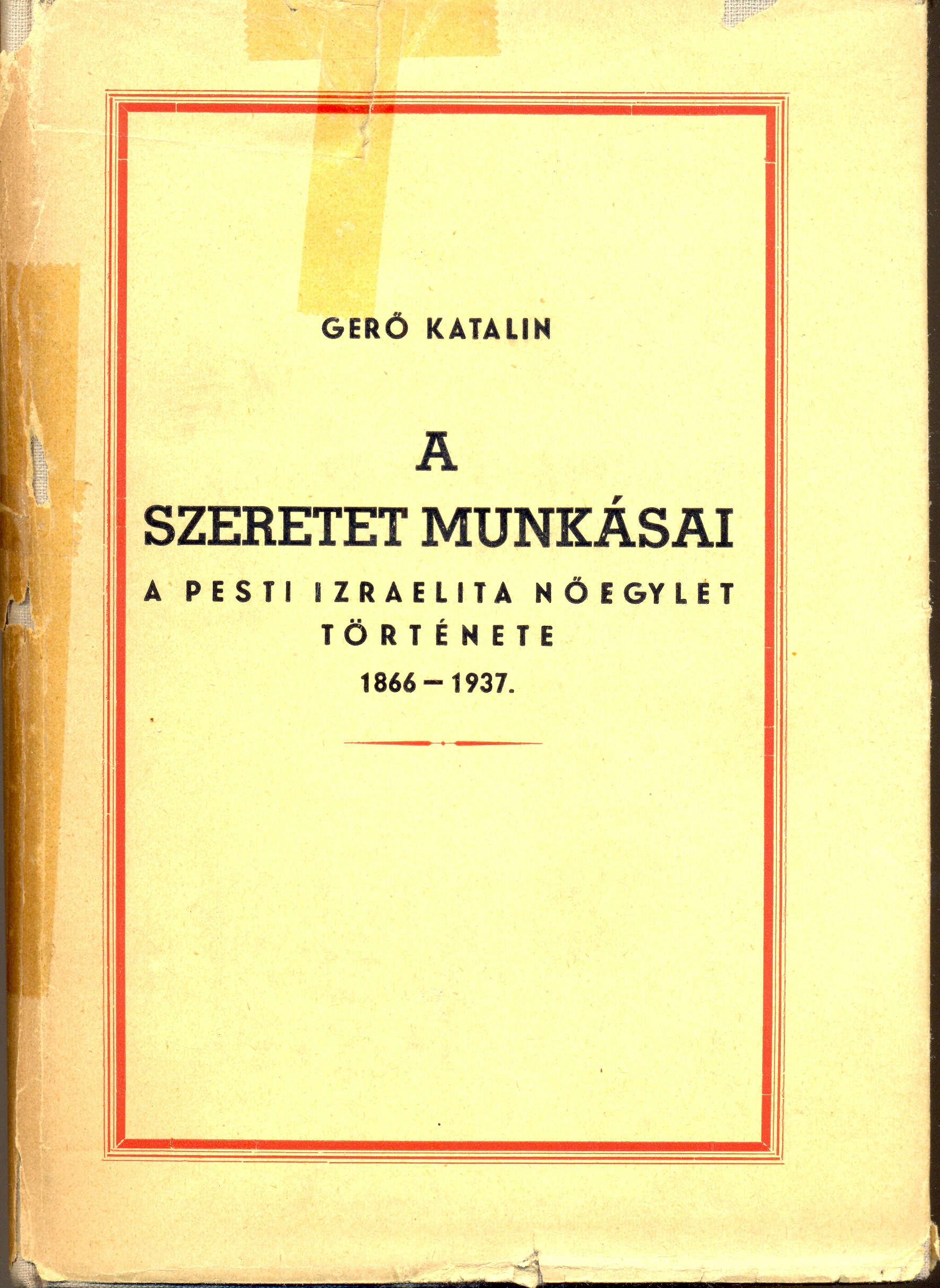 Gerő Katalin: A szeretet munkásai c. művének címlapja. Megjelent 1938-ban.